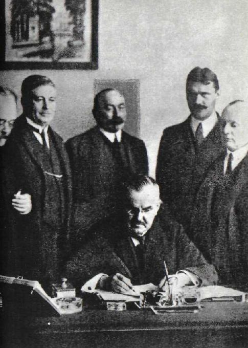 Władysław Grabski i jego współpracownicy.